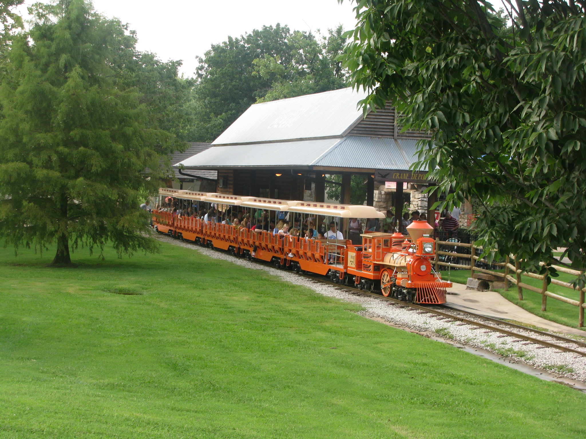 Tulsa Zoo